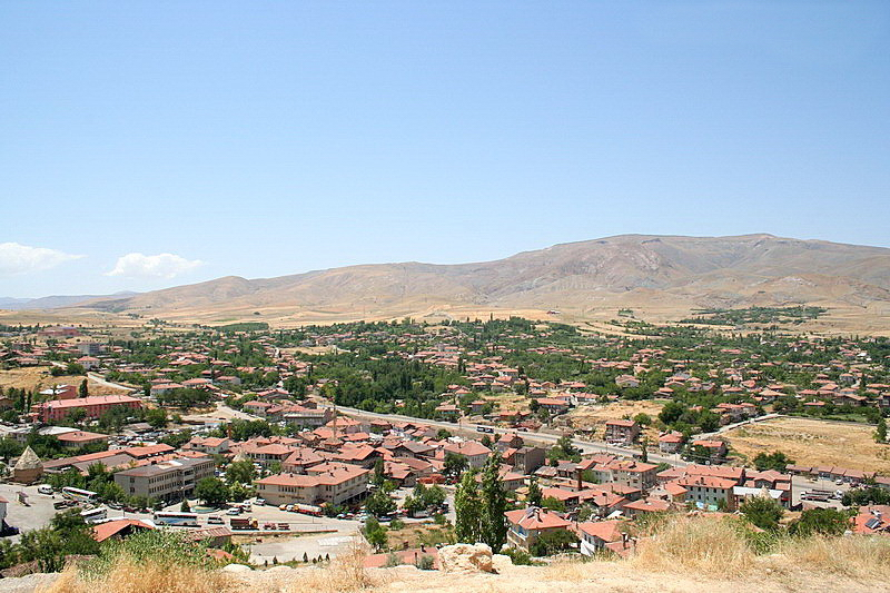 Divriği,Sivas, Turkey .Genel Görünüm